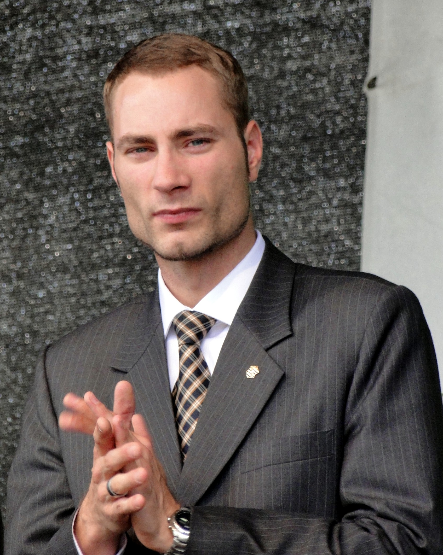 Patrick Schreiber, sächsischer Politiker der CDU